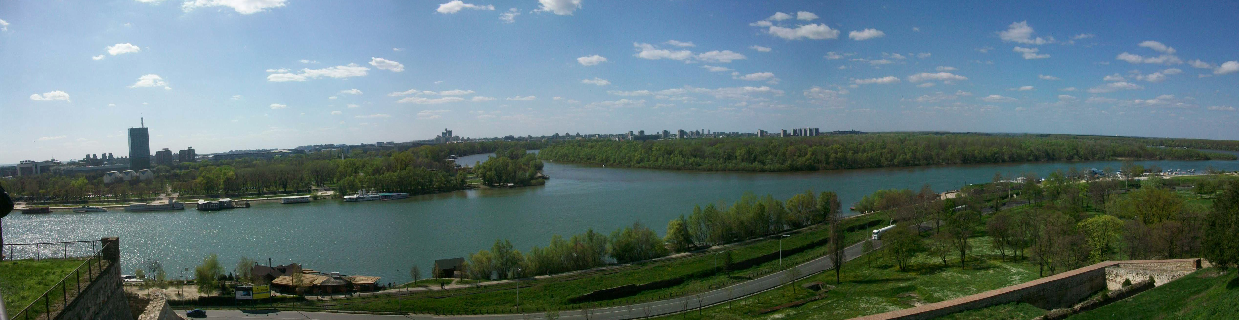 Sırbistan'ın başkenti Belgrad'daki Kalemegdan'dan bir görüntü.